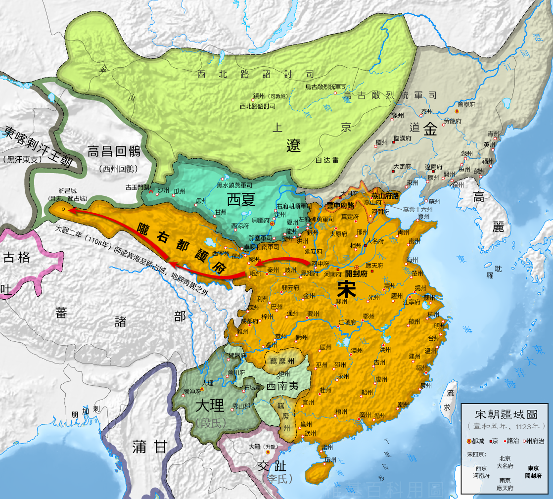 北宋疆域图